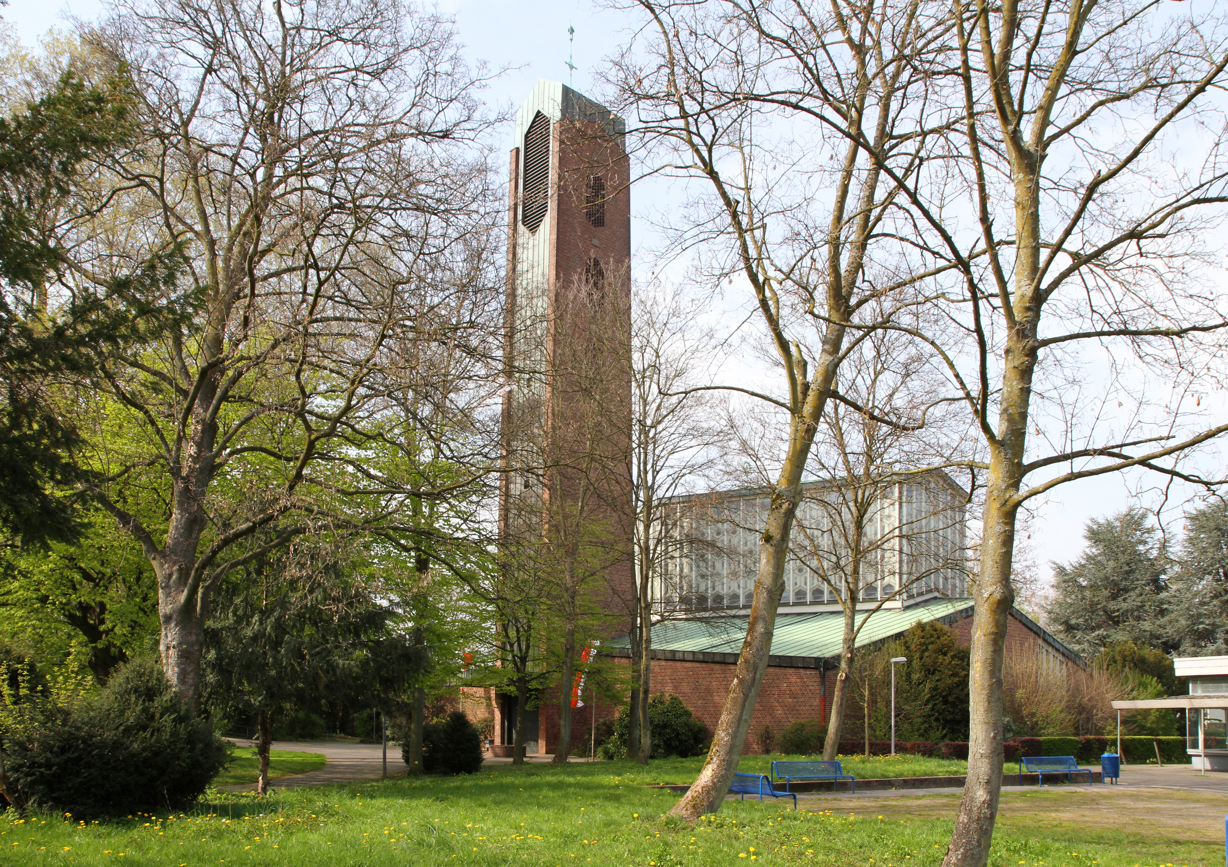 Köln-Mülheim, Sankt-Bruder-Klaus in der Bruder-Klaus-Siedlung Die Kirche wurde von dem Kölner Architekten Fritz Schaller entworfen und 1956/57 erbaut